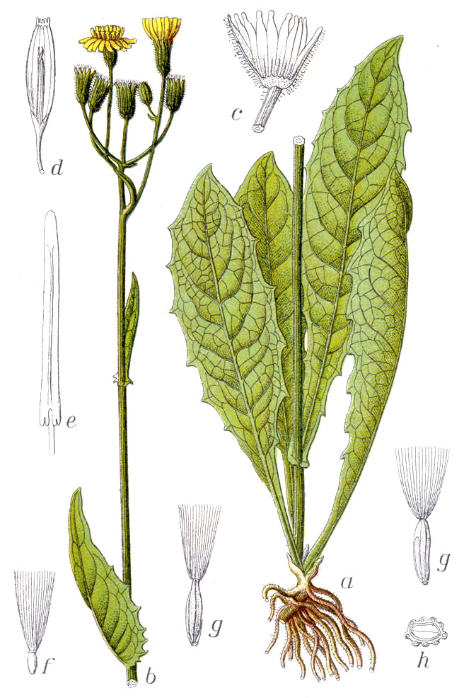 Crepis paludosa (L.) Moench Original Caption Sumpf-Pippau, Crepis paludosa